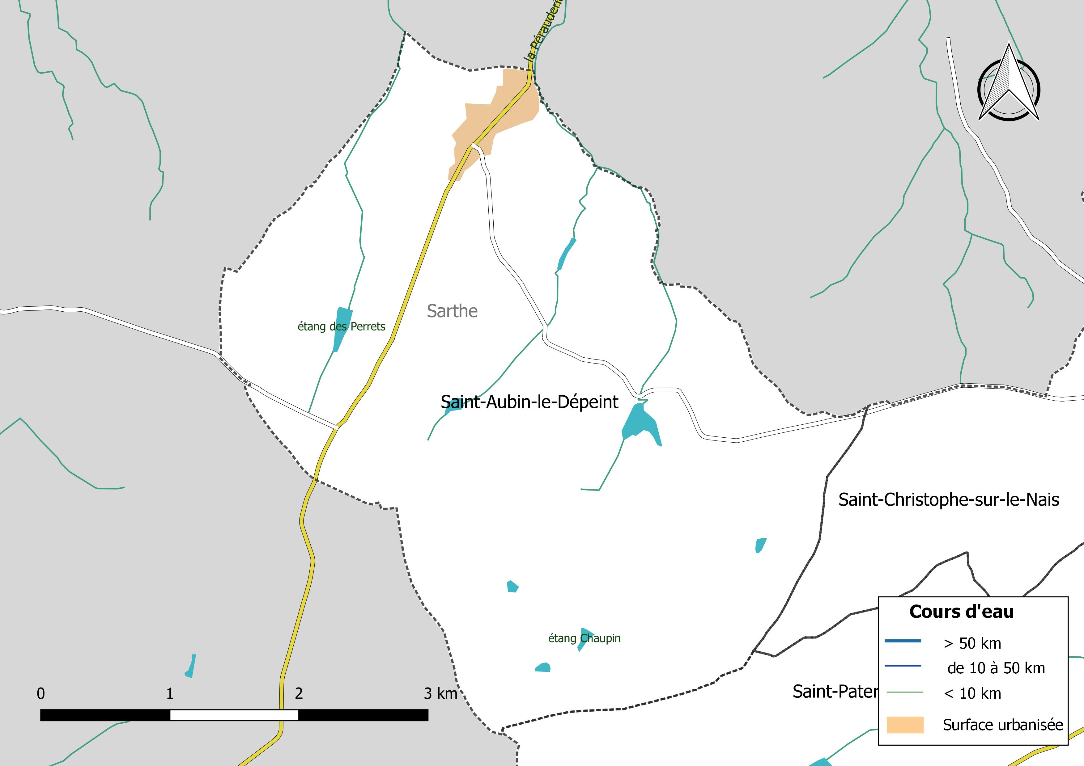 Carte du réseau hydrographique de la commune de Saint-Aubin-le-Dépeint (France).